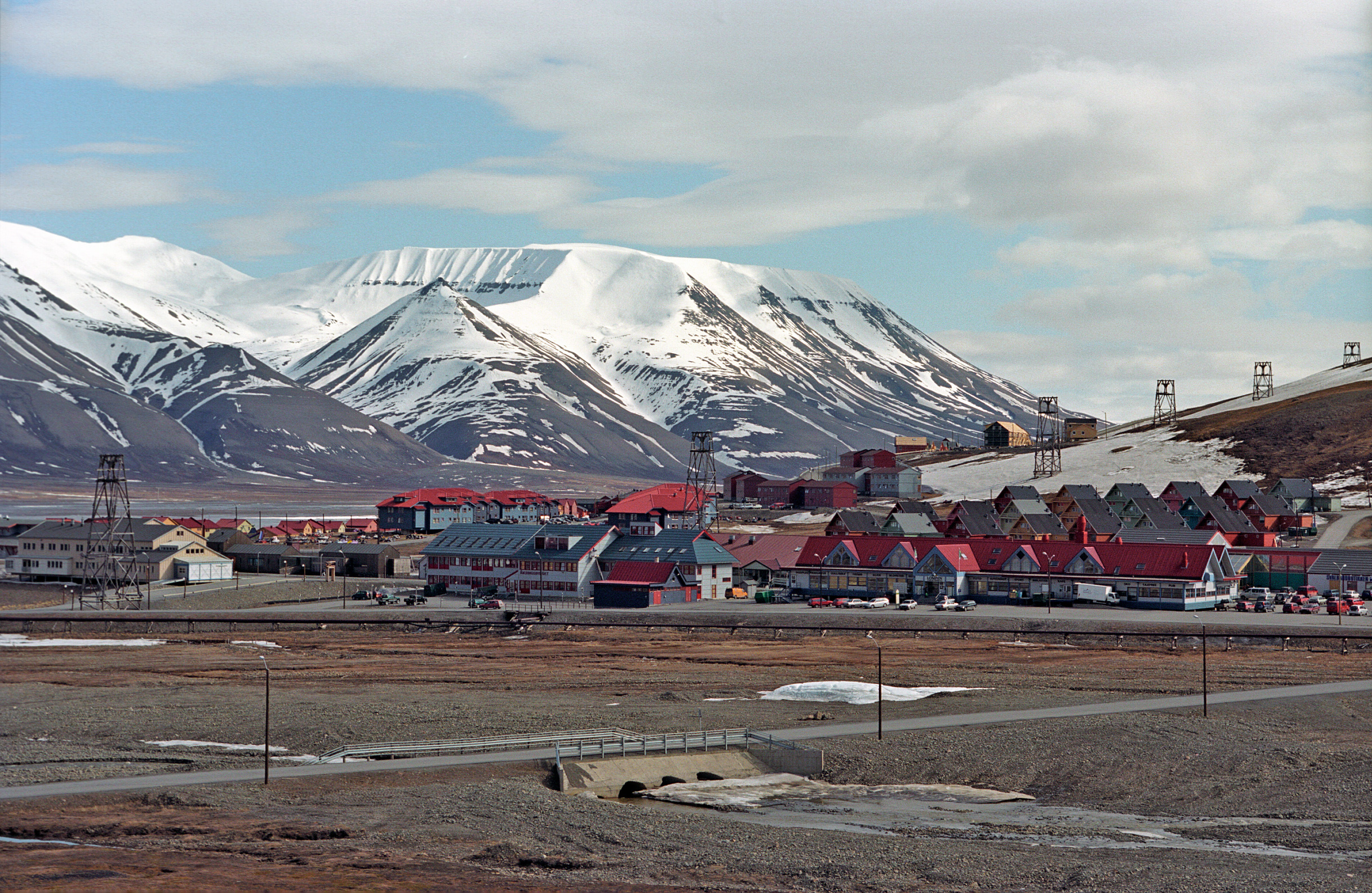 Svalbard, Longyearbyen